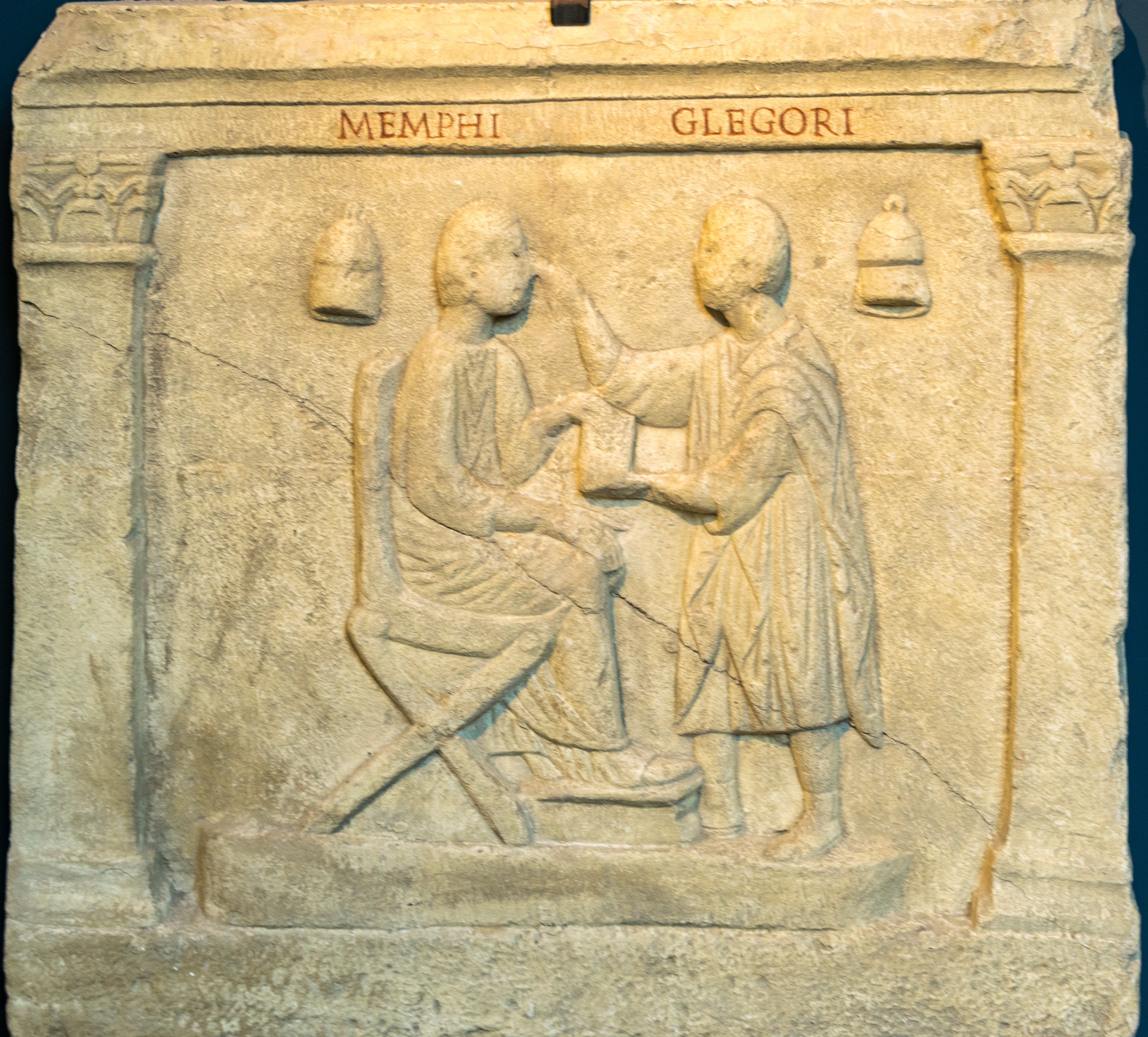 Darstellung einer Augenuntersuchung/behandlung auf der Seite eines Sarkophags. Eine römische Kopie aus der zweiten Hälfte des 3. Jahrhunderts von einem griechischen Original.